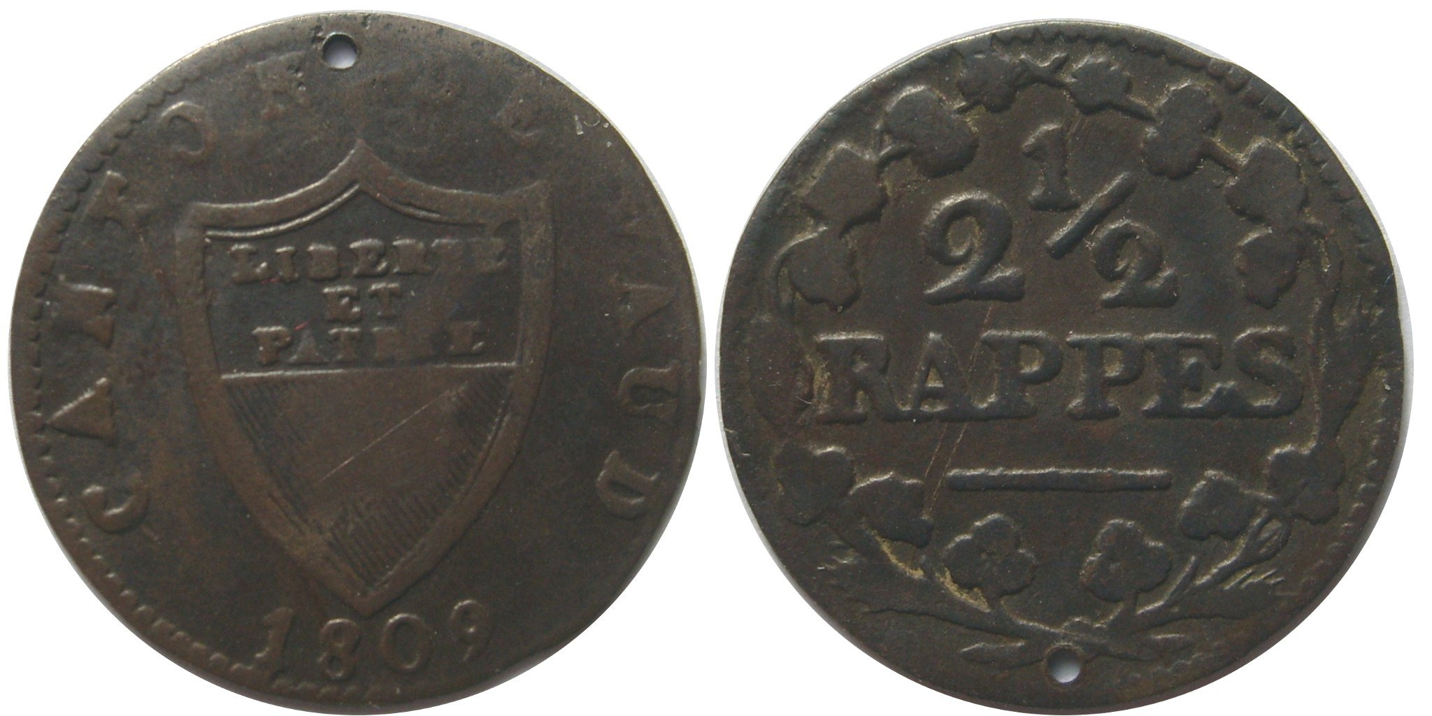 2 1/2 Rappes, Canton de Vaud, 1809.